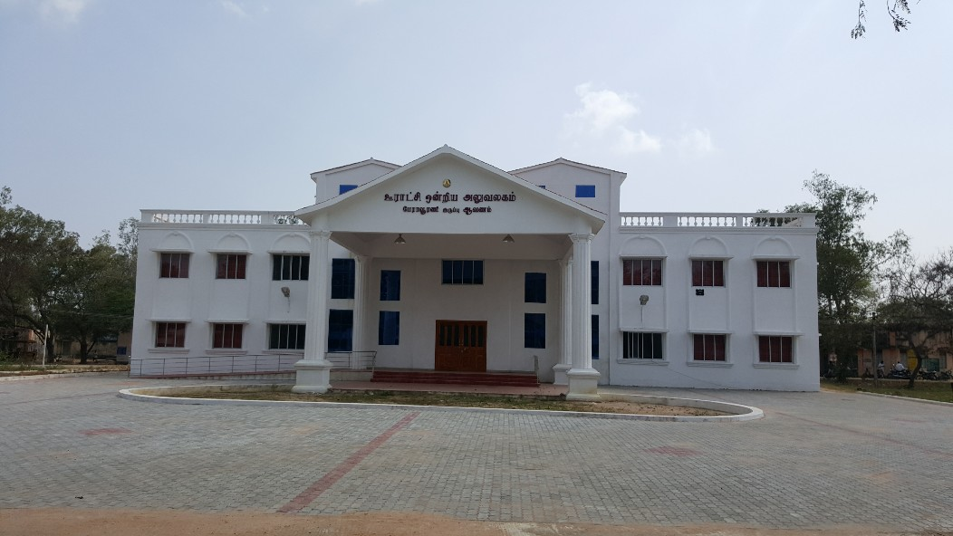 பேராவூரணி ஊராட்சி ஒன்றிய அலுவலகம்